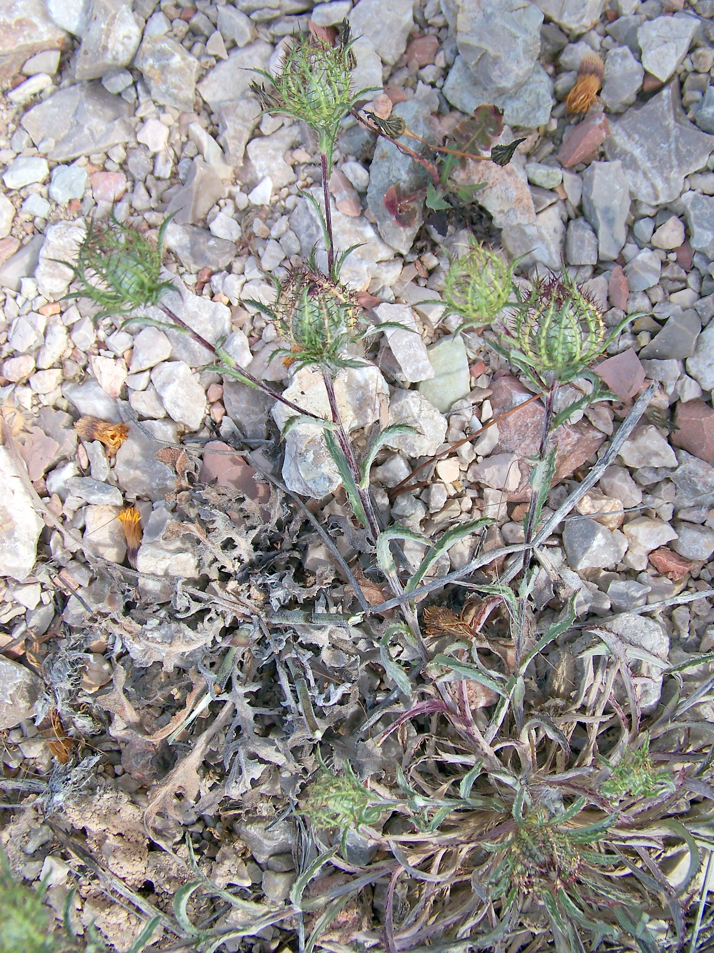 Atractylis cancellata (cancelillos, cardo enrejado,...)- Vista parcial; capítulo central sentado de la roseta basal y pedúnculos capitulares laterales. - circa Villa Suzana, Colonia Illicitana, Albatera (Provincia de Alicante, España).